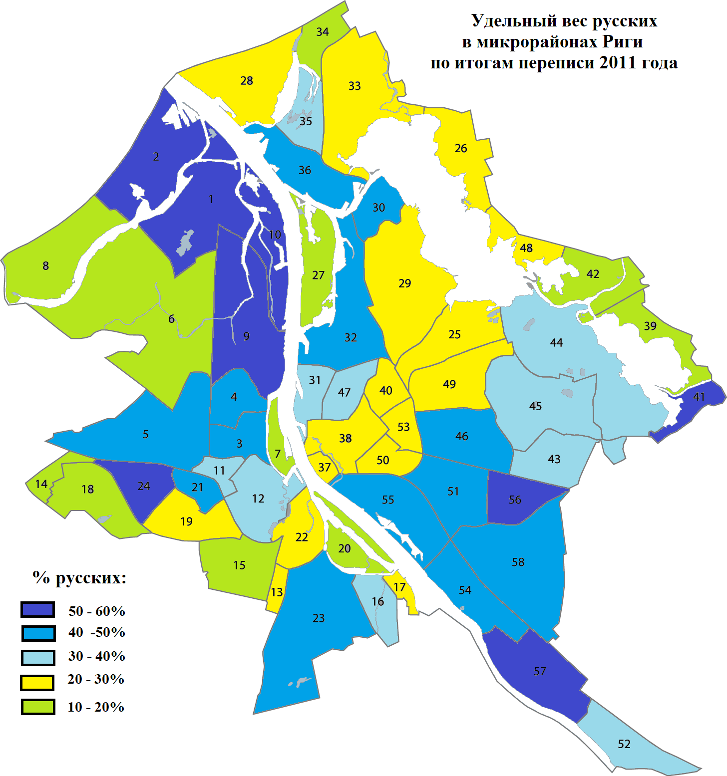 Удельный вес (%) русских в микрорайонах Риги по итогам переписи населения 2011 года